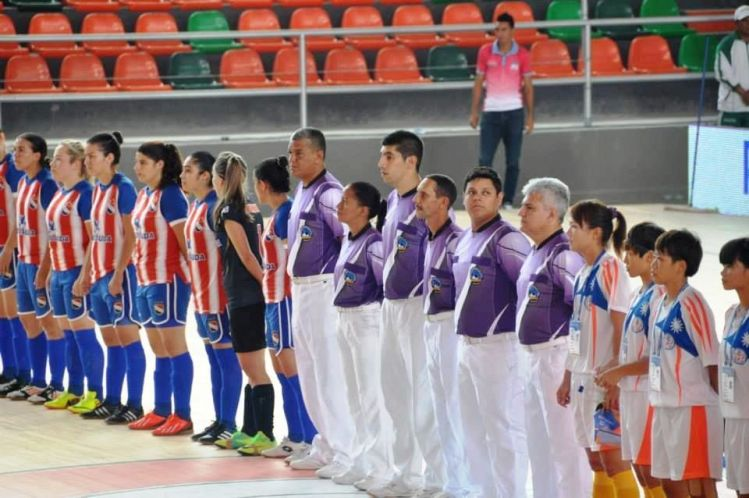 Foto da partida entre Paraguai e Taipé Chinesa, no II Mundial Feminino de Futebol de Salão AMF, na Colômbia em 8/11/2013.